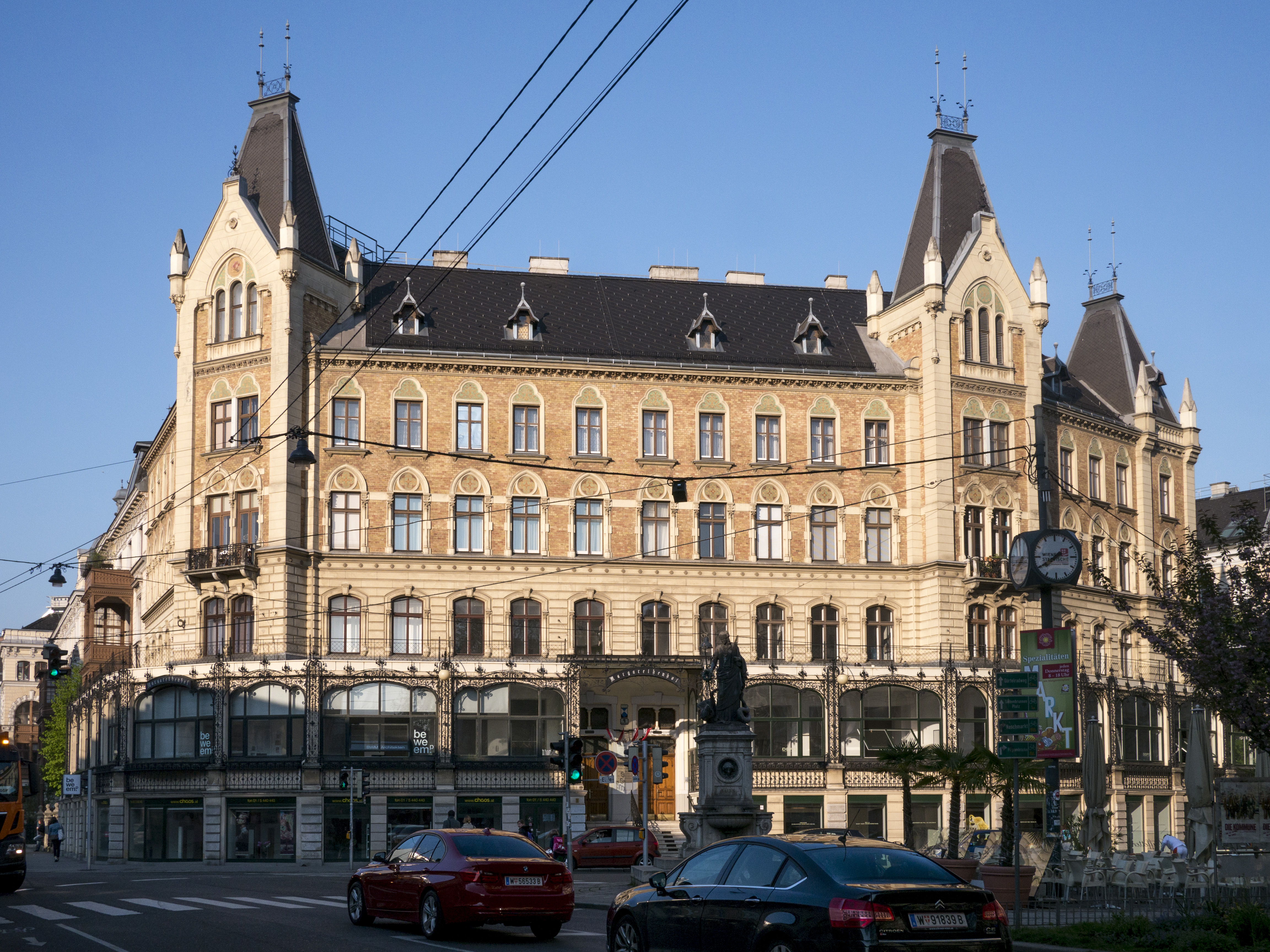 Wien Margaretenplatz Margaretenhof